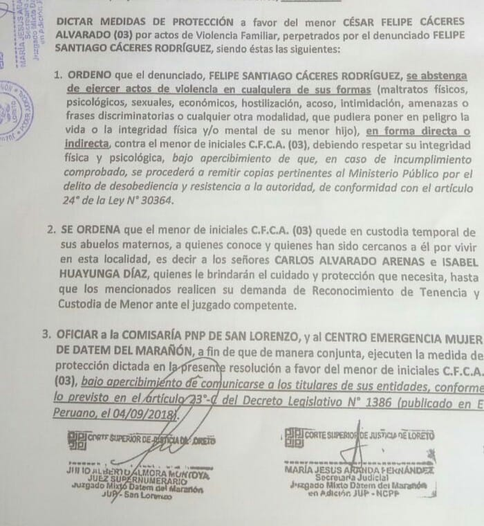 HIJO DE SONIA ALVARADO QUEDARÁ BAJO LA CUSTODIA TEMPORAL DE SUS ABUELOS MATERNOS.